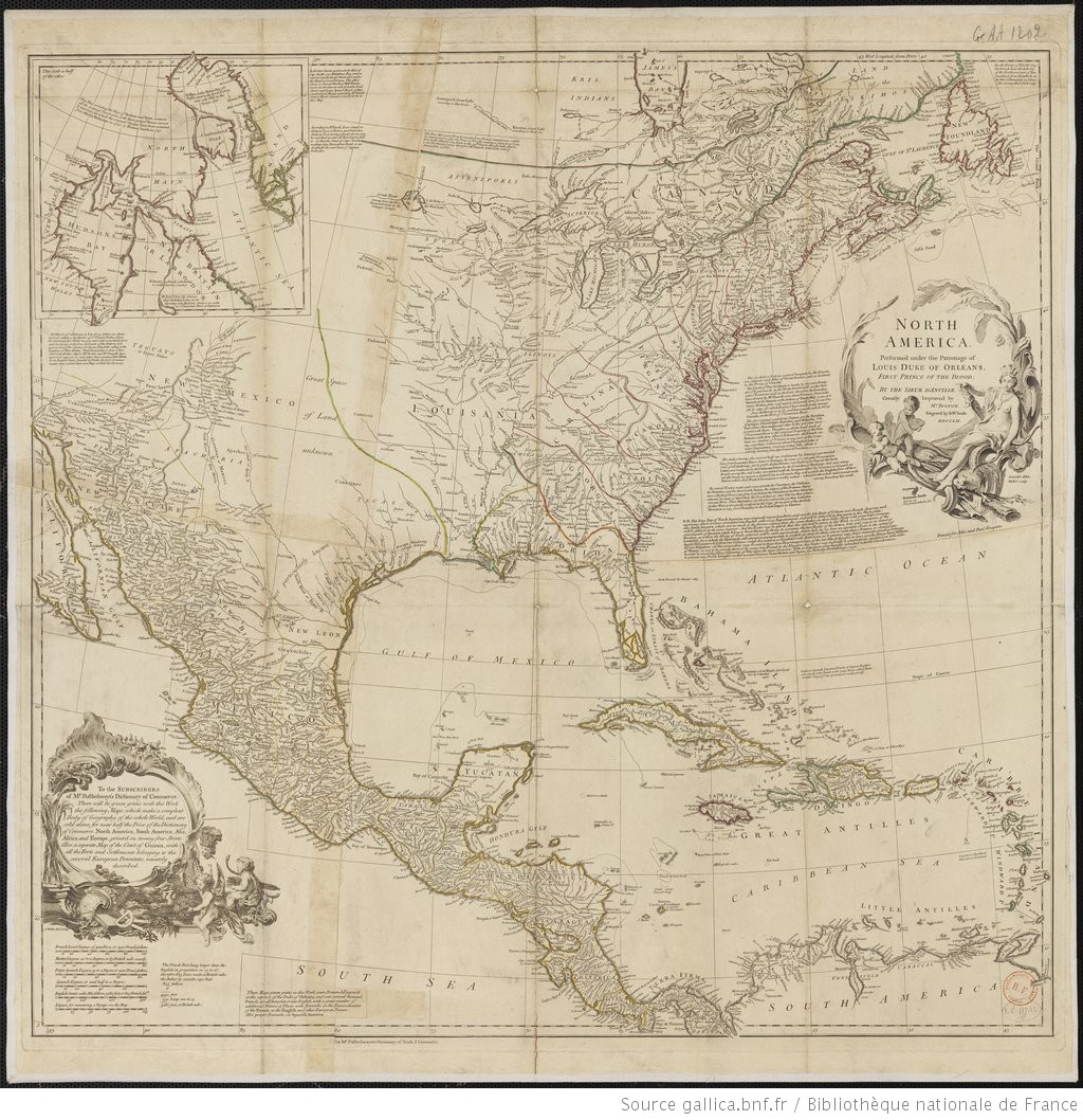 Carte de l'Amérique du nord publiée à Londres par John and Paul Knapton, en 1752. Plusieurs cartographes ont participé à l'élaboration de cette carte : Solomon Bolton (17..-17..?), Jean-Baptiste Bourguignon d'Anville (1697-1782) et Richard William Seale (17..-1785). Elle a été gravée par plusieurs graveurs : Gravelot (1699-1773) et Anthony Walker (1726-1765). Conservée à la Bibliothèque nationale de France (